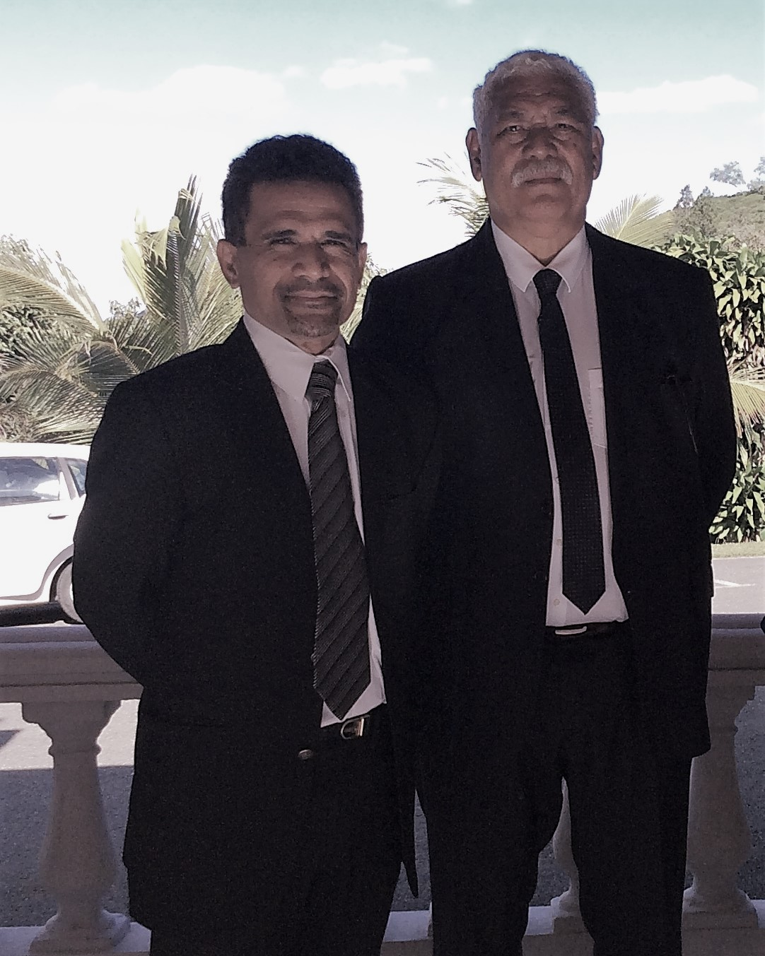 Leaders du Rassemblement Démocratique Océanien